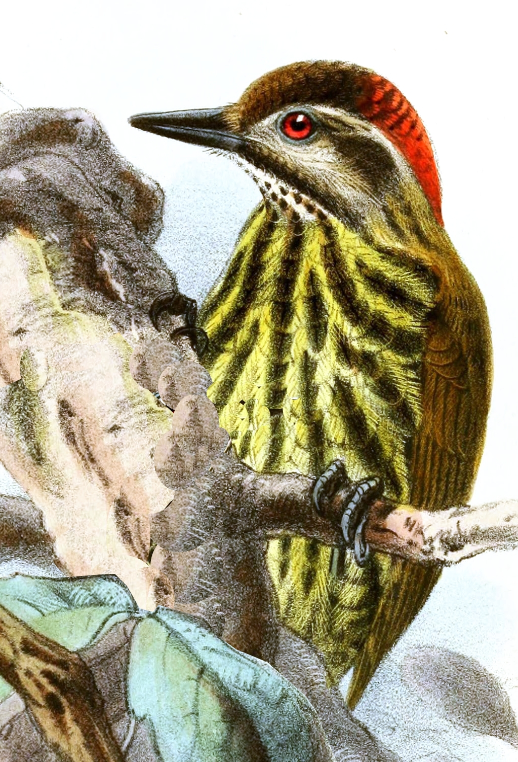 Dendropicos lugubris